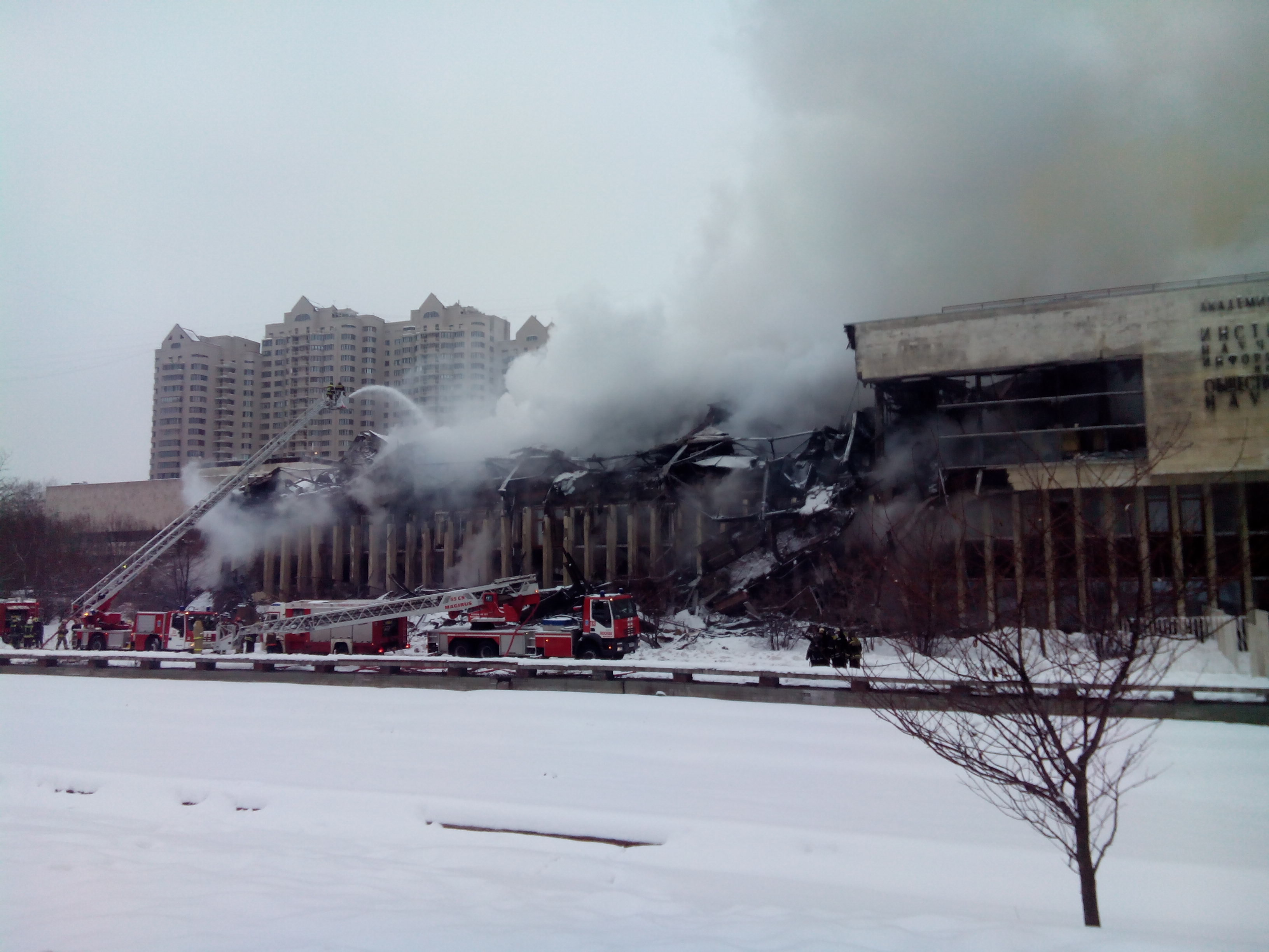 31 января 2015 г. Тушение пожара — ИНИОН РАН